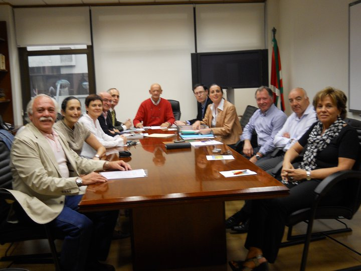 Reunión de la Comisión Gestora de Ondarroa